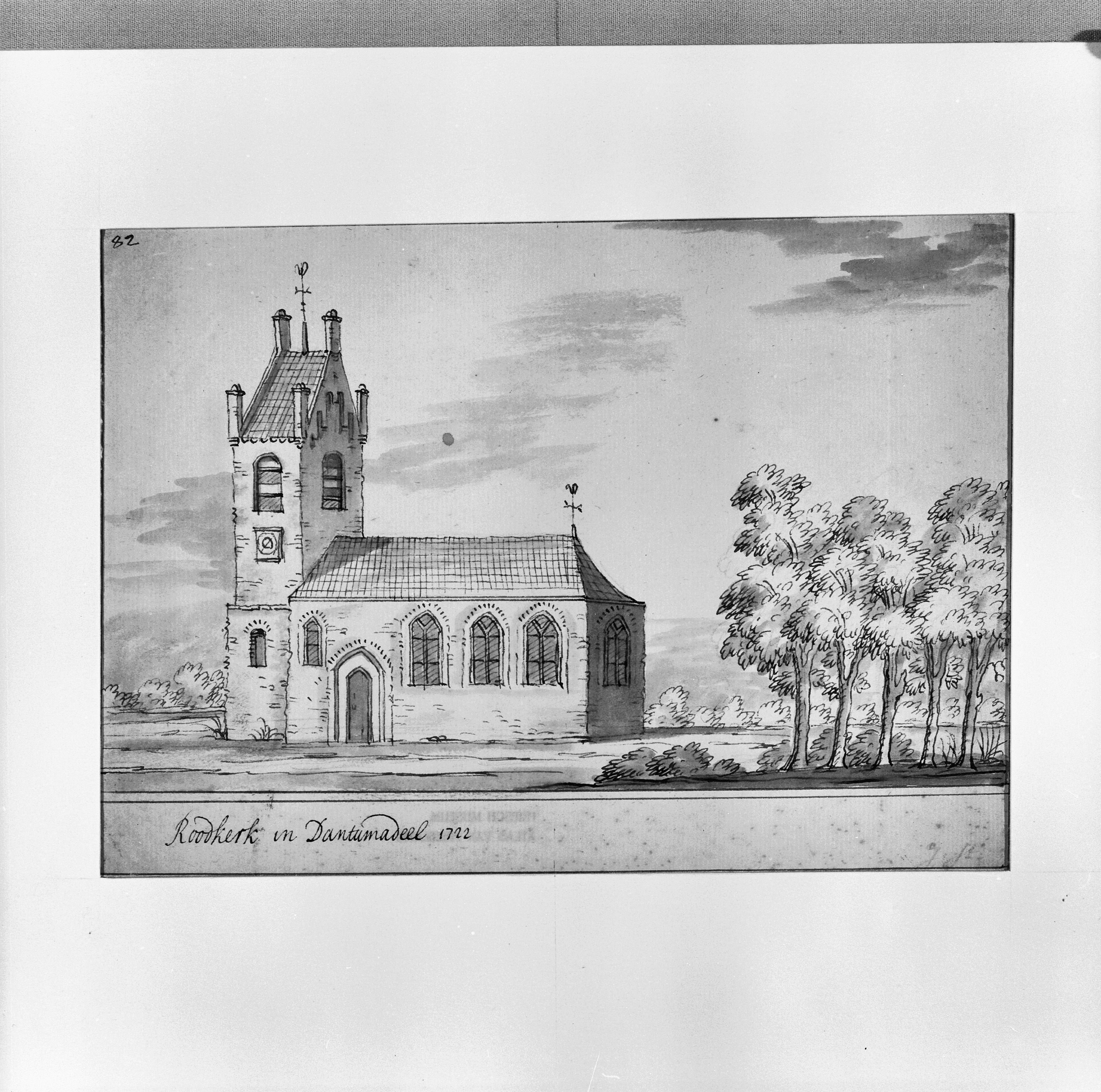 Nederlands Hervormde Kerk: 1722 tekening van J. Stellingwerf Origineel in het Friesch Museum te Leeuwarden, exterieur